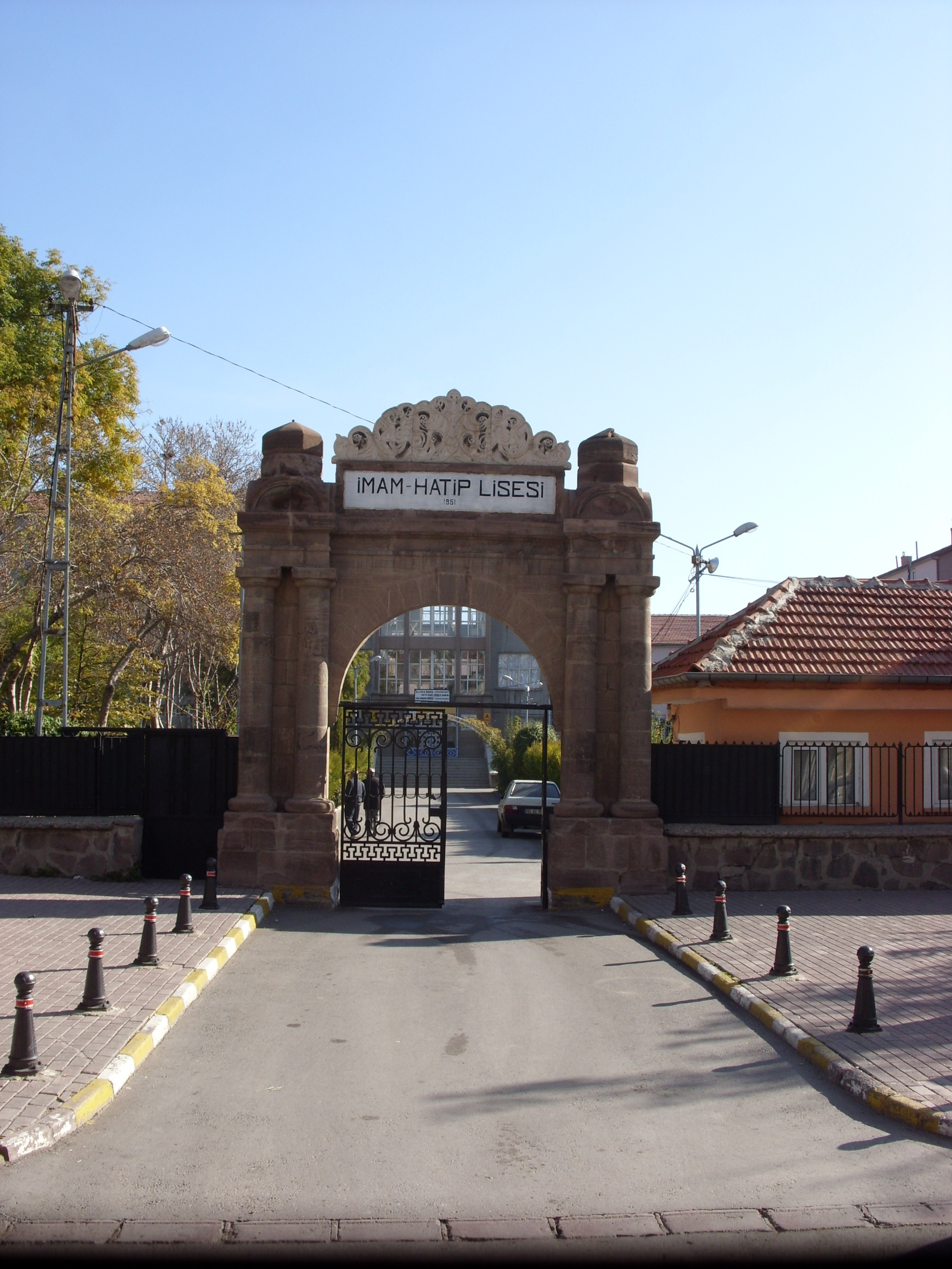 İMAM HATİP LİSESİ